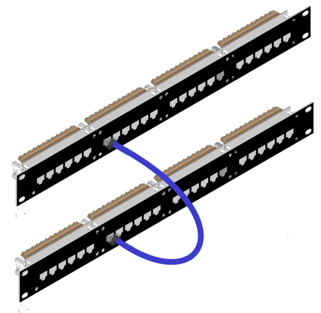 Схема построения СКС кросс-коннект